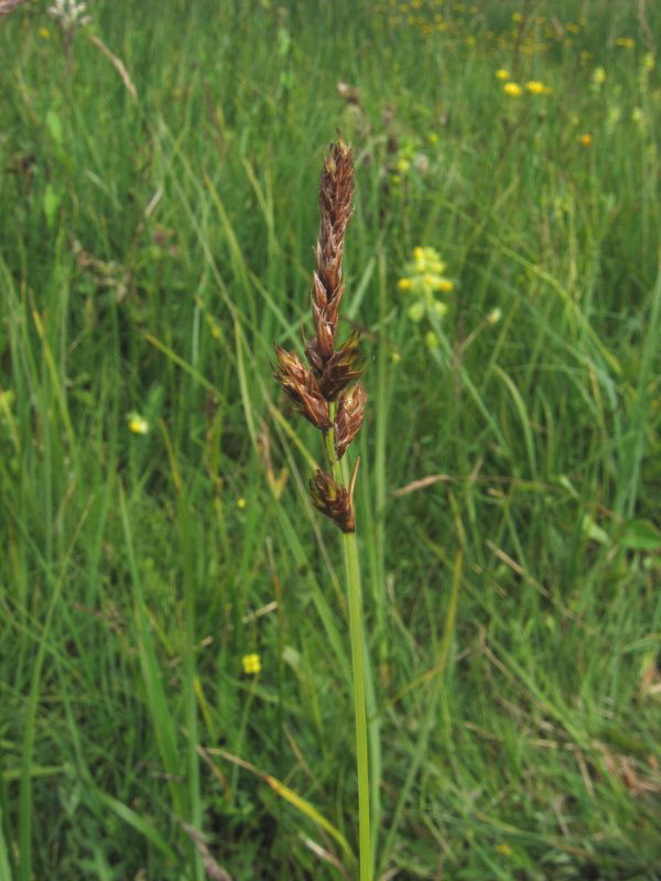 Zweizeilige Segge Carex disticha, Warnow-Wiesen bei Rostock